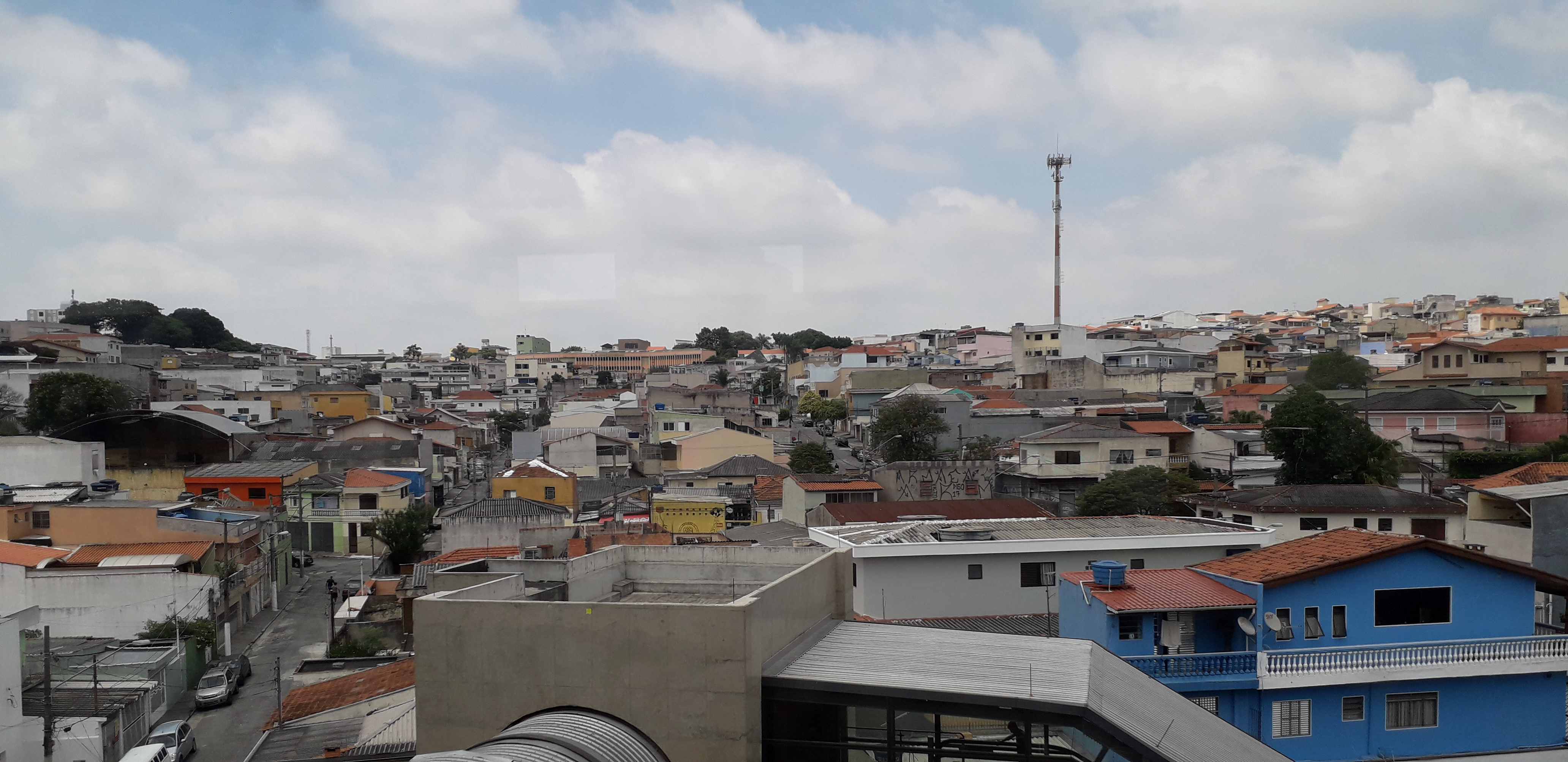 Parque São Lucas e Estação São Lucas